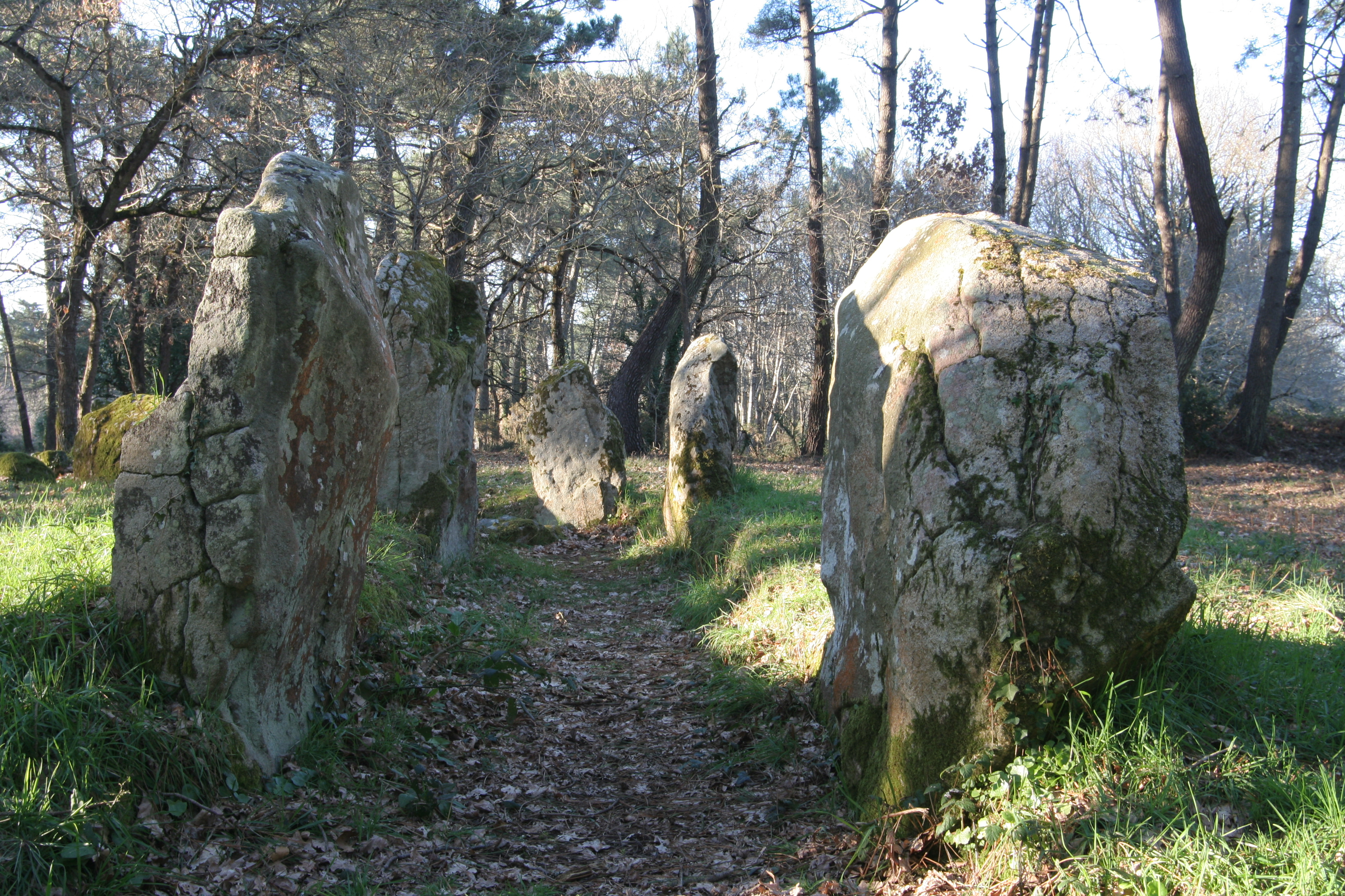 Allée couverte de Luffang à Crach.